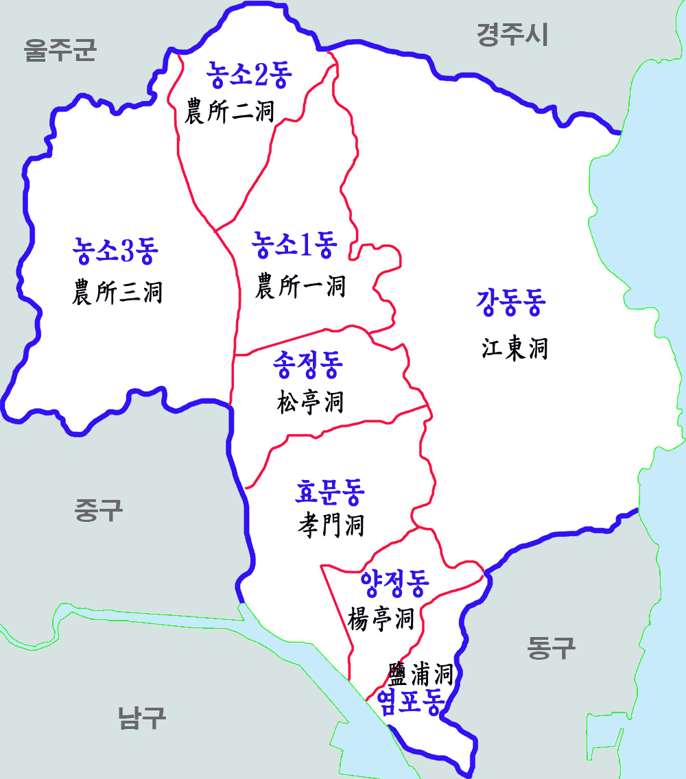 울산시 북구 행정구역도